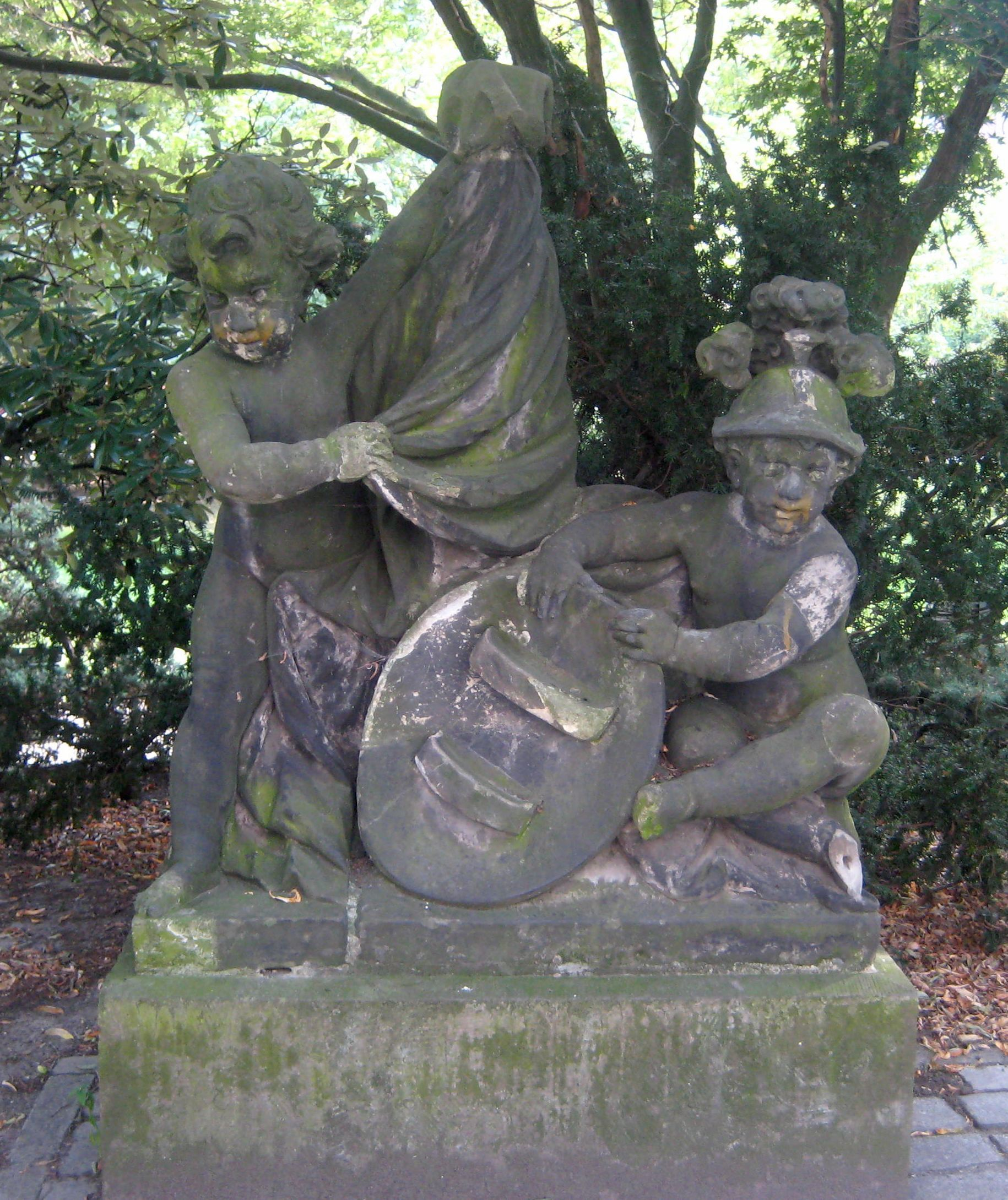 Puttengruppe im Lapidarium des Köllnischen Parks in Berlin-Mitte. Die Figuren tragen kriegerische Attribute. Die Sandsteinskulptur aus der zweiten Hälfte des 18. Jahrhunderts stammt von der Attika der ursprünglichen Spittelkolonnaden.